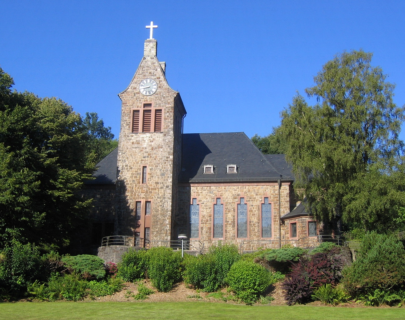 Evangelische Kirche im Stadtteil Ihmert in Hemer.